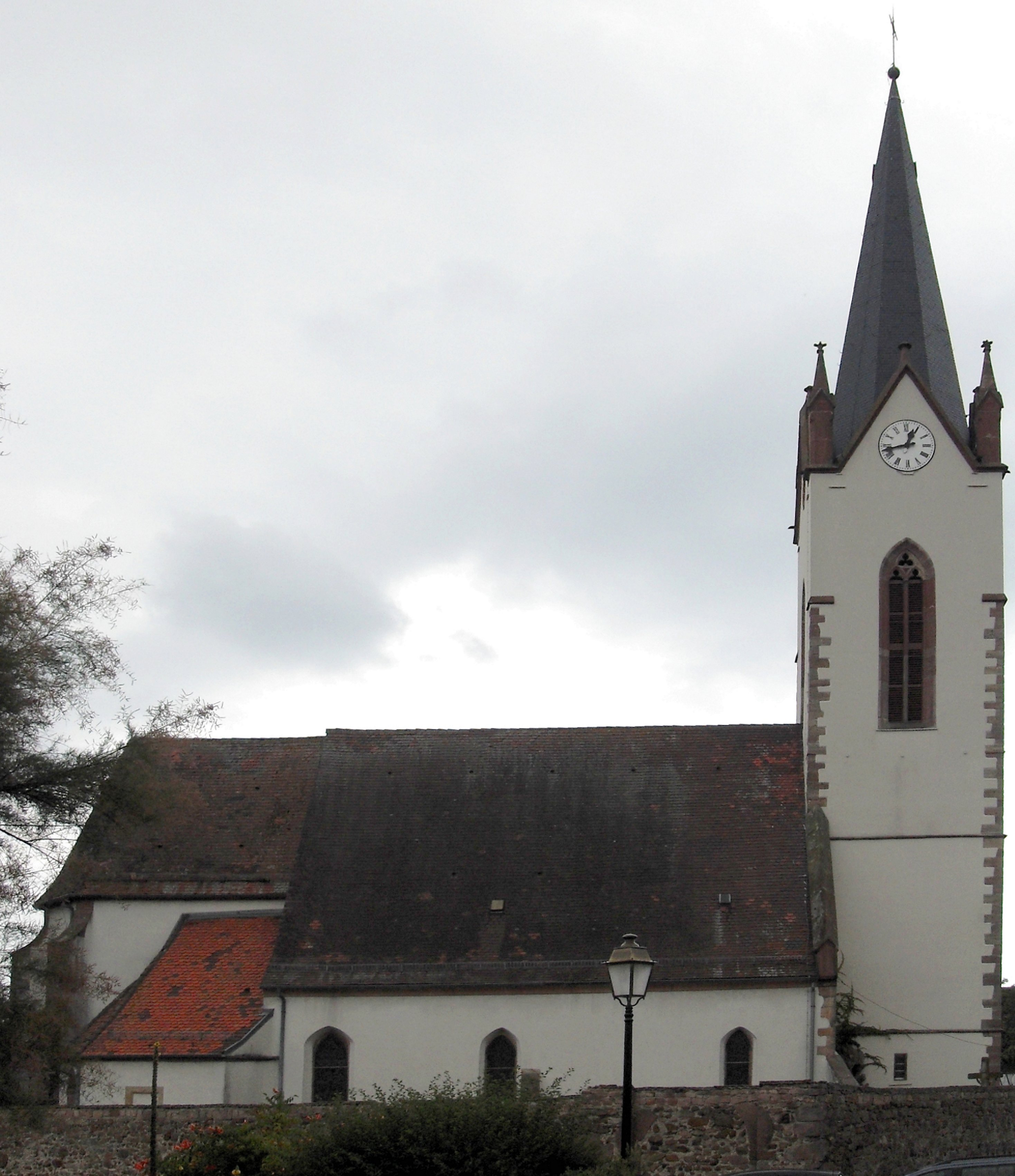 L'église Saint-Blaise à Hartmannswiller